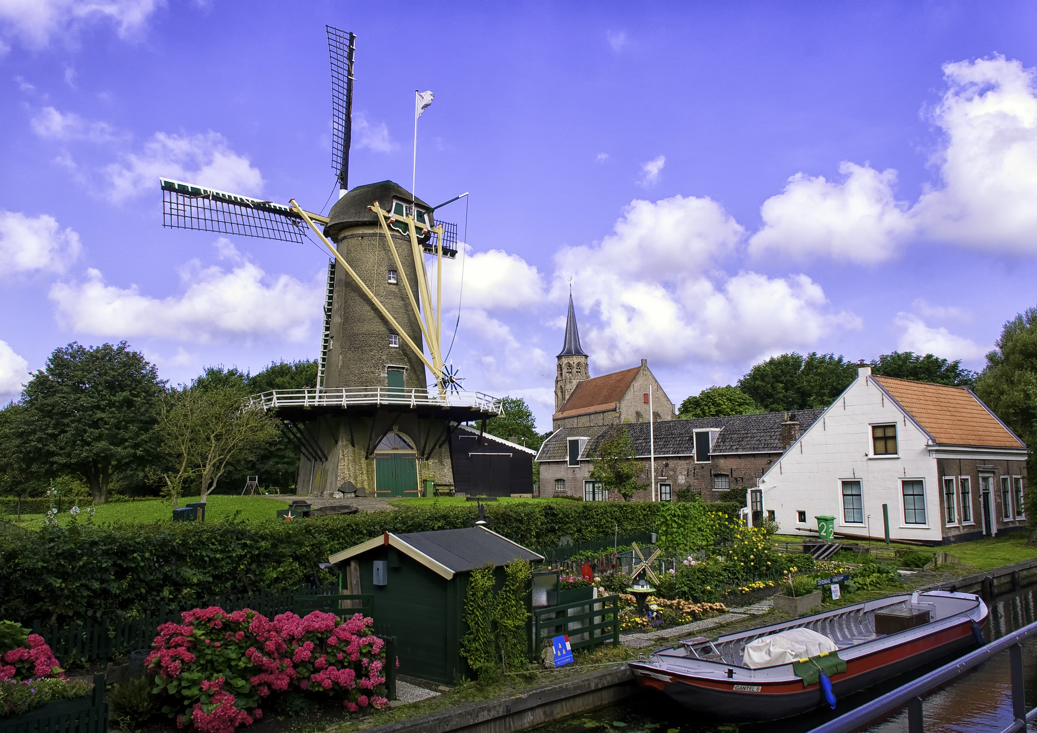 De Korenaer - de Haagse molen